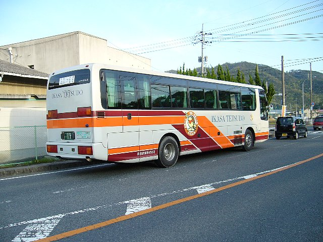 井笠鉄道バス 「カブトガニ号」 笠岡市北川にて